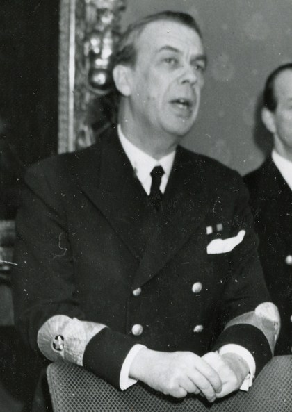 Sjövärnskonferensen 1947: Chefen för Marinstaben, konteramiral Erik Anderberg (1892-1990), invigningstalar och hälsar flottiljcheferna välkomna